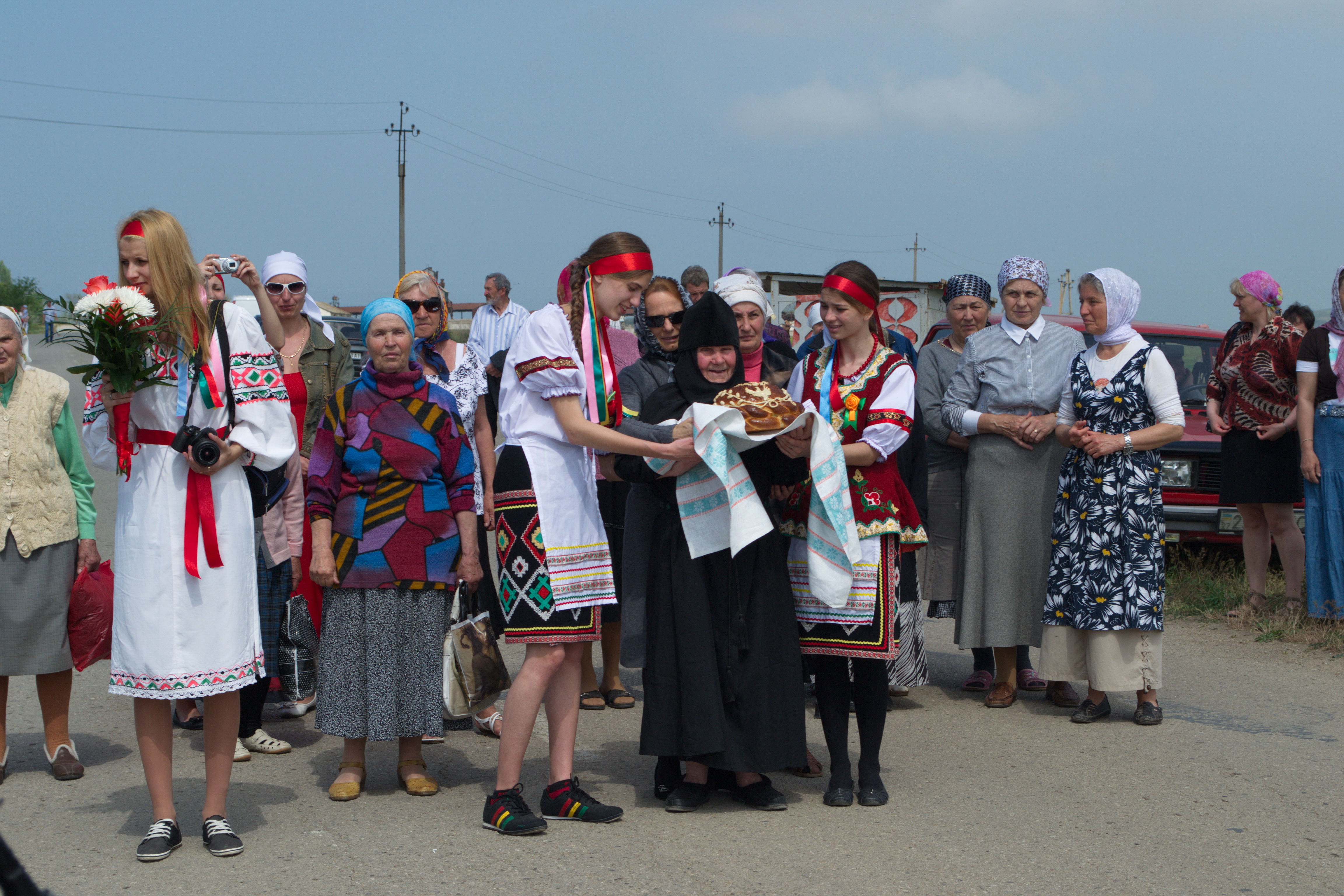 Настоятельница Катерлезского Свято-Георгиевского монастыря матушка Акилина